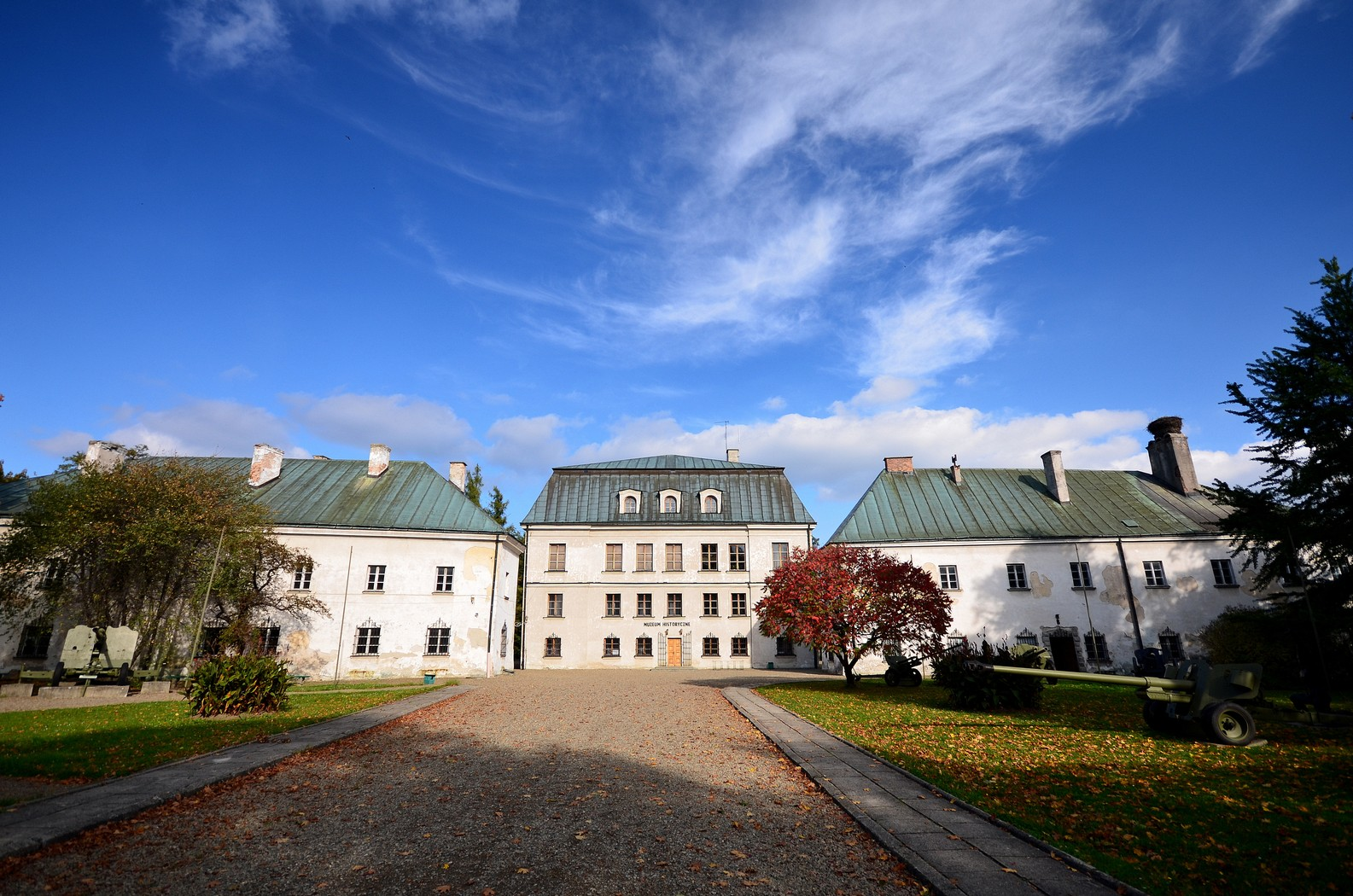 Dukla - pałac